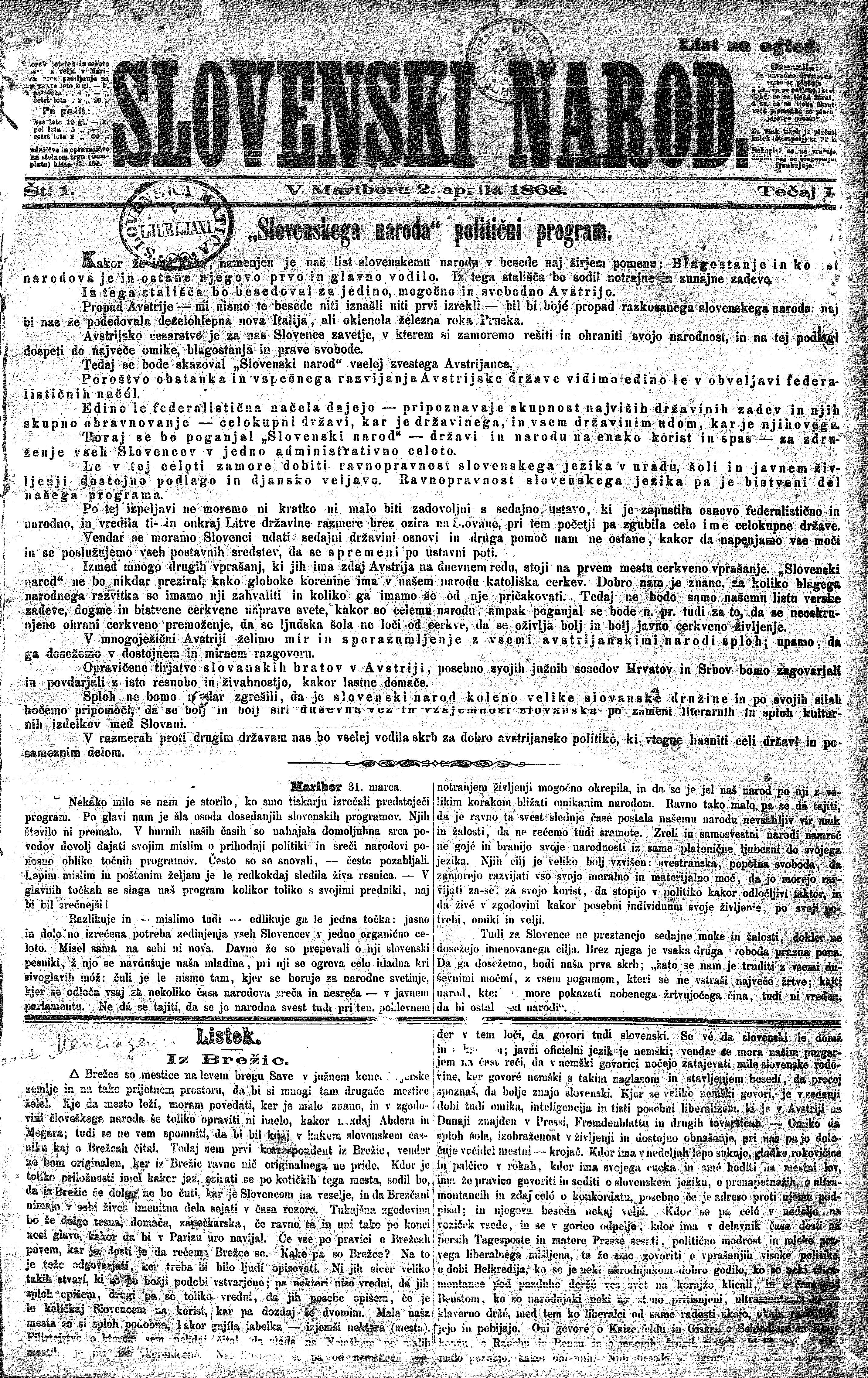 Skenirana naslovnica prve številke časopisa Slovenski narod iz Narodne in univerzitetne knjižnice. Naslovnica je stara preko 140 let, zato so ji avtorske pravice potekle.